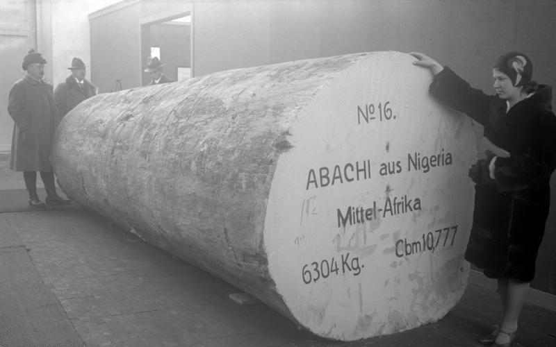 Die Eröffnung der 7. Grünen Woche in den Ausstellungshallen am Kaiserdamm in Berlin ! Ein Riesenbaumstamm aus Nigeria in Mittelafrika in einem Gewicht von 6.304 kg. auf der Ausstellung.